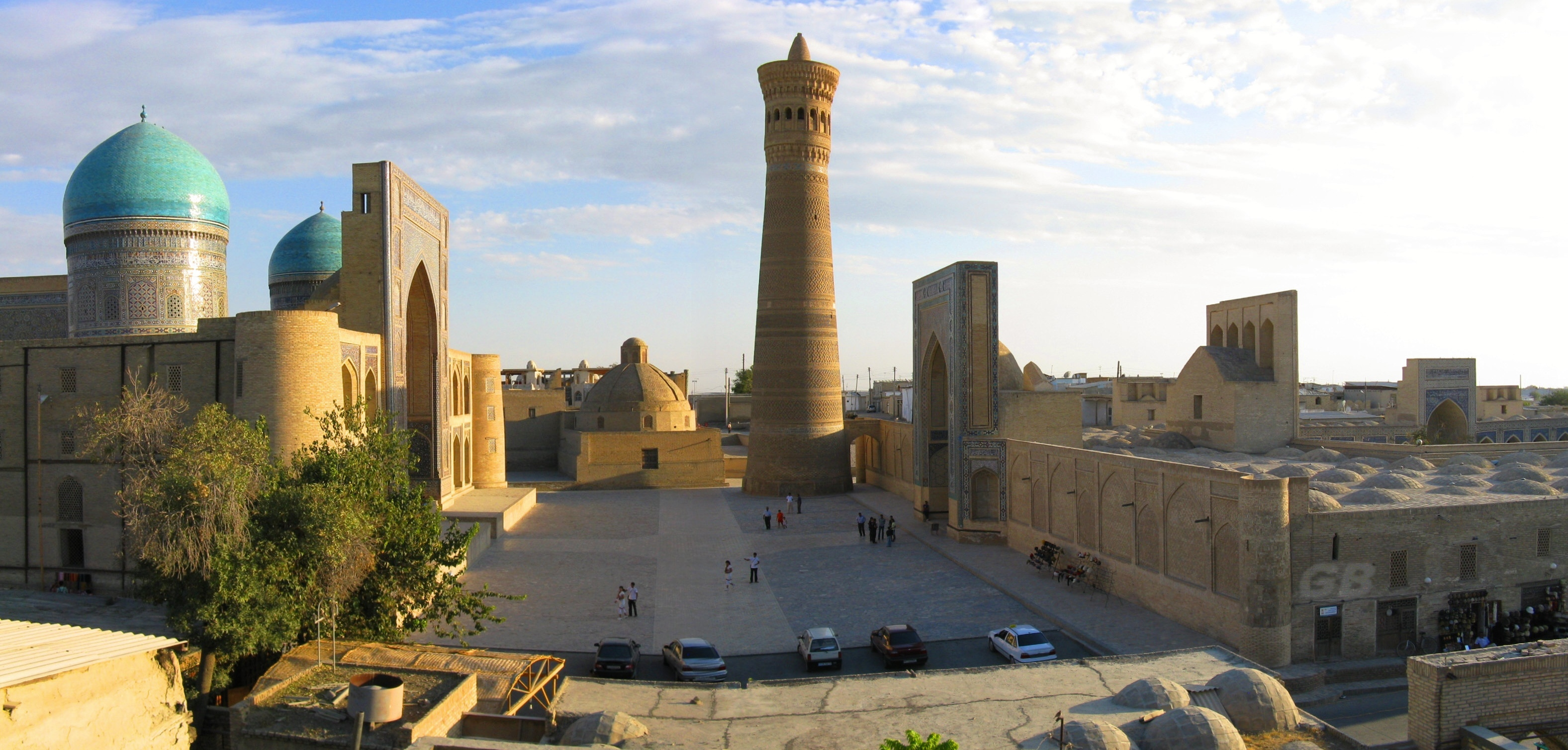 Kalon-Ensemble in Bukhara (Uzbekistan)